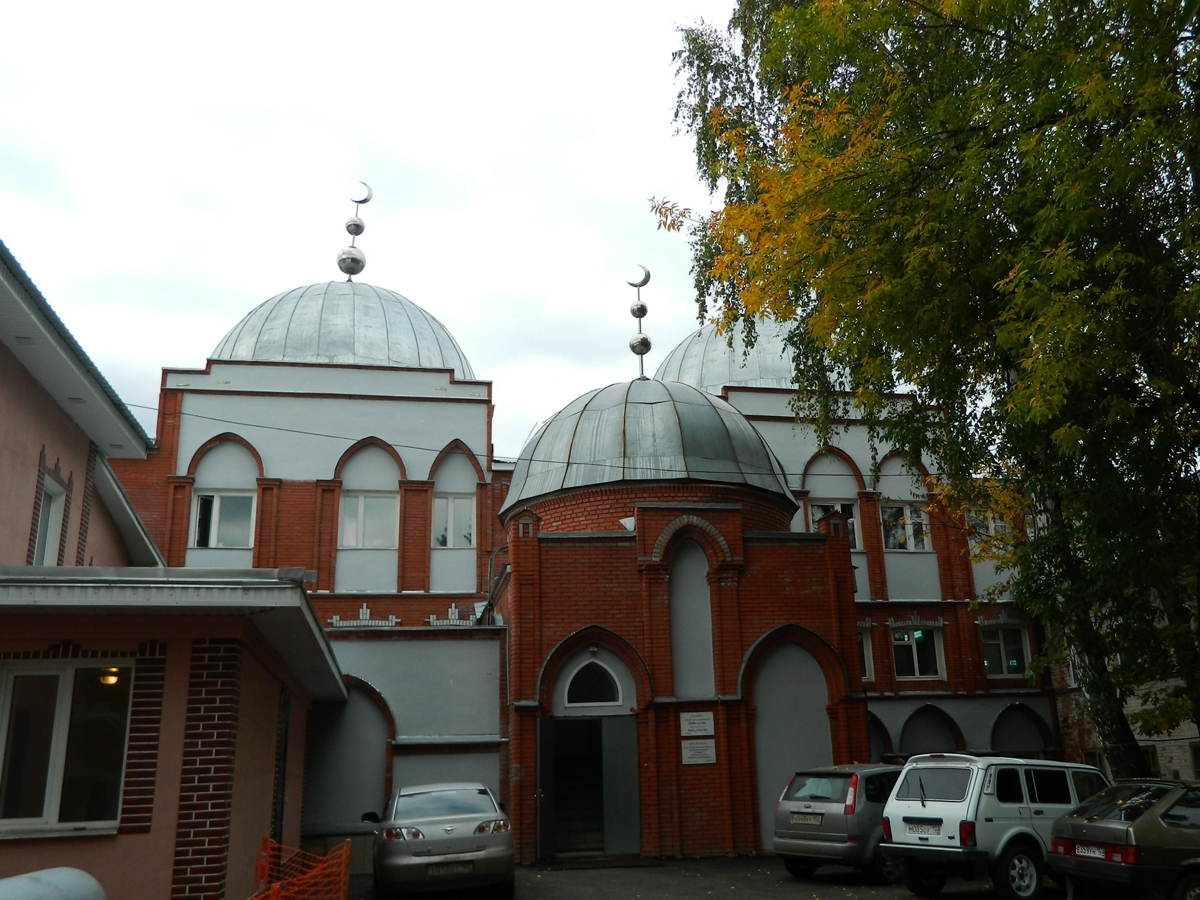 Мечеть «Галия» и Исламский колледж имени Марьям Султановой